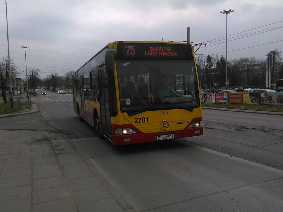 Merceses O530 na ul rzgowskiej , 2016r